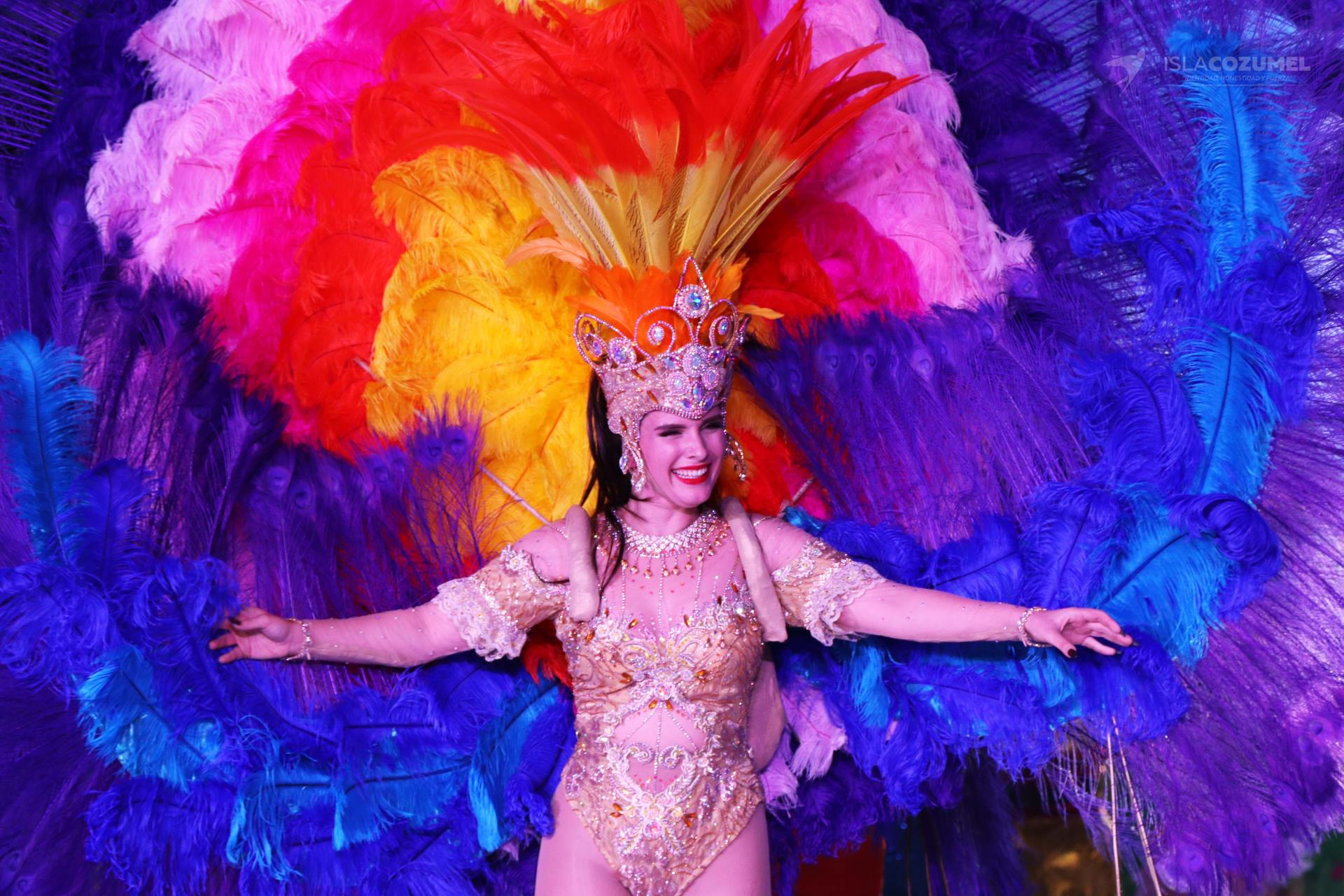 Reina del Carnaval Cozumel 2017